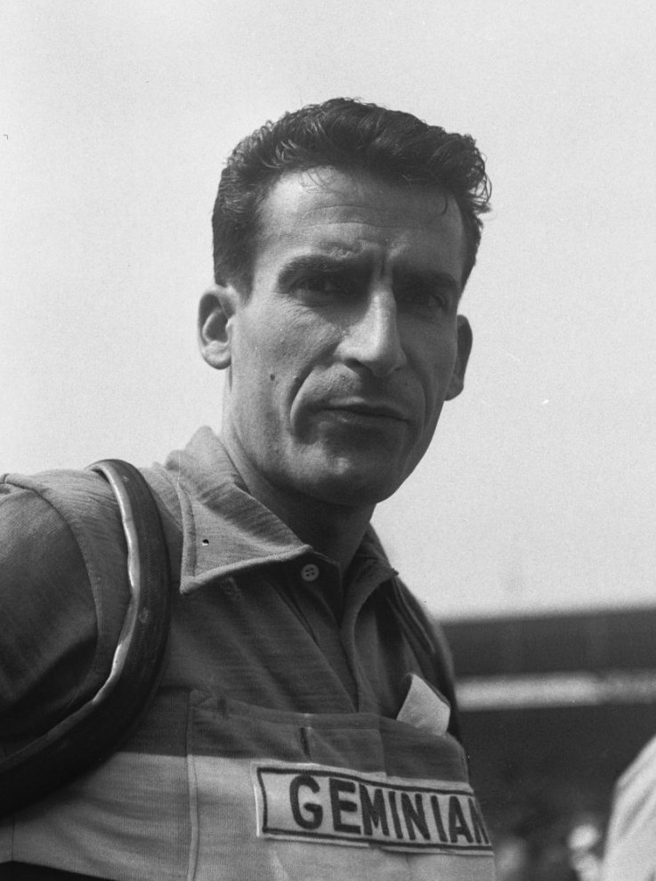 Tour de France. Raphaël Geminiani (Frankrijk)